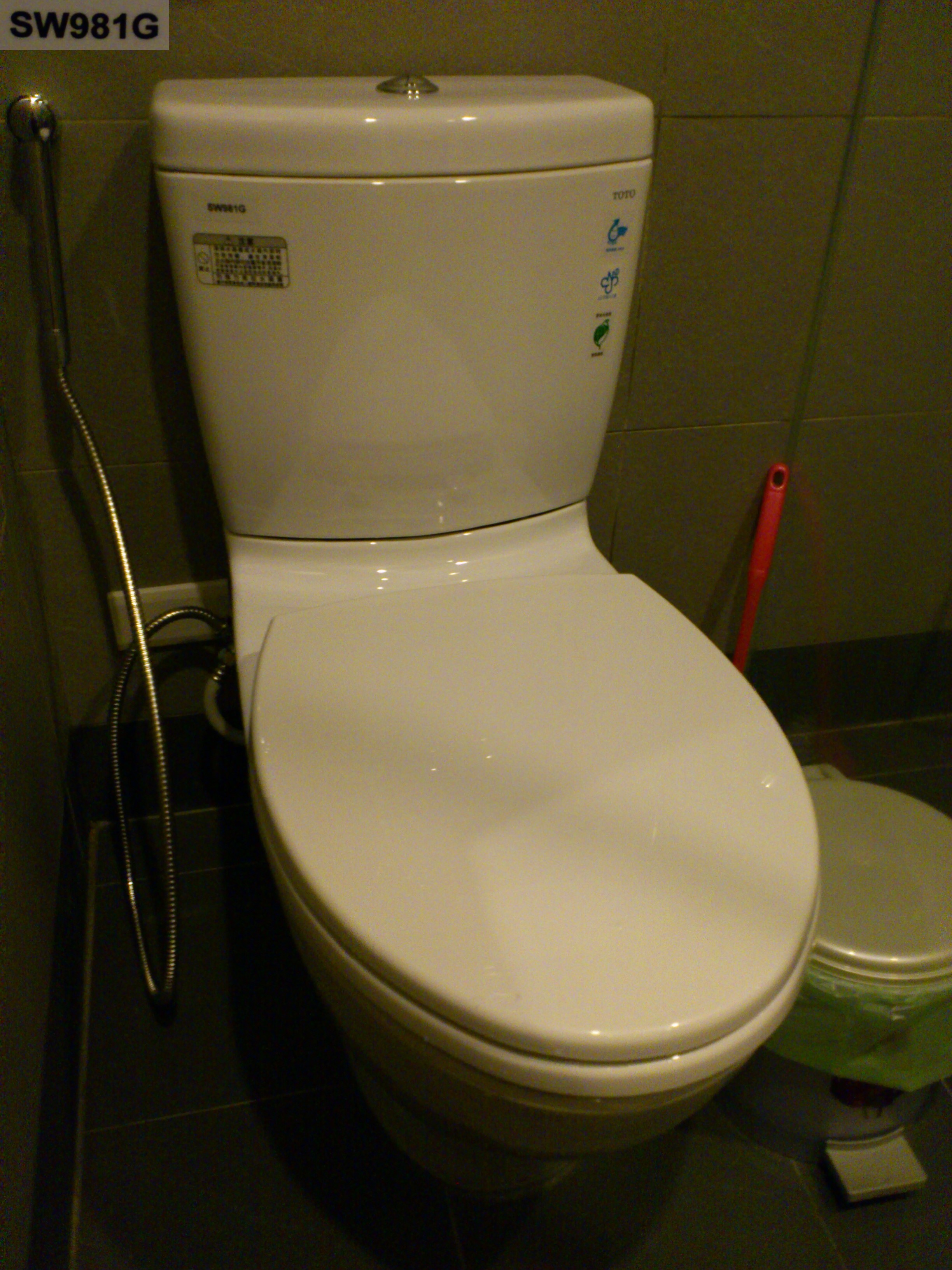 中文（台灣）: 長榮桂冠酒店（基隆）公共廁所採用的臺灣東陶分離式馬桶SW981G。